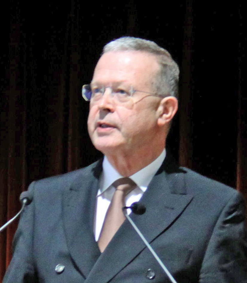 Karl Starzacher bei einer Rede anlässlich der Eröffnung der Ausstellung "Legalisierter Raub" in Rotenburg an der Fulda